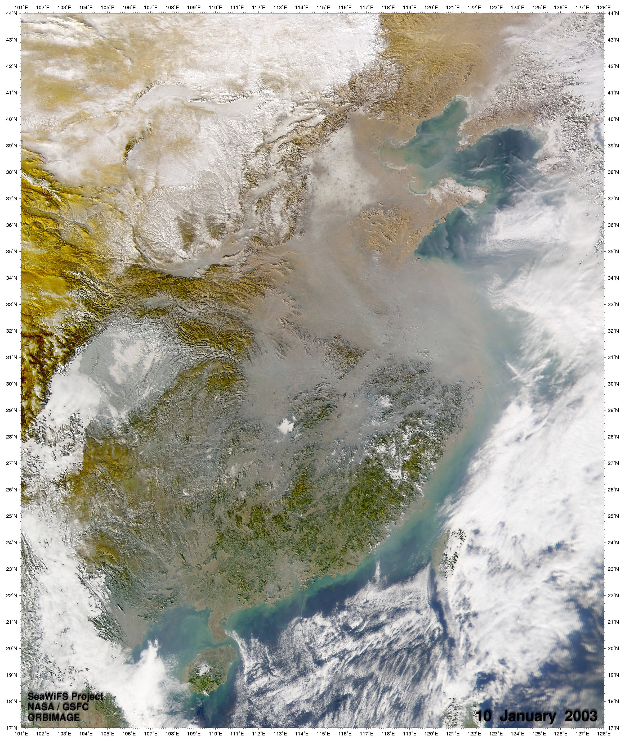 Smog over China